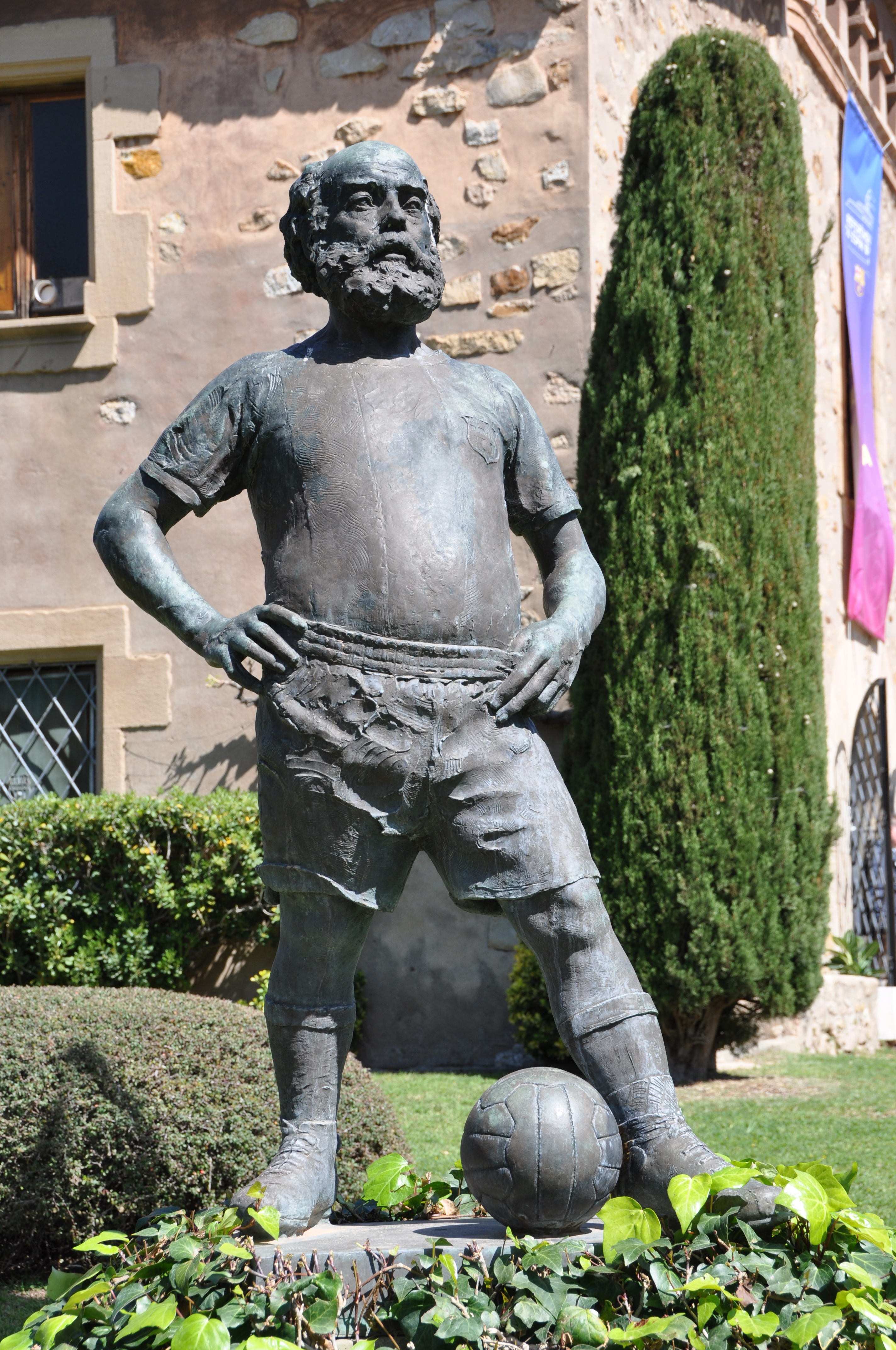 L'Avi del Barça, de Josep Viladomat (1972) Recinte de la Masia del FC Barcelona, Barcelona